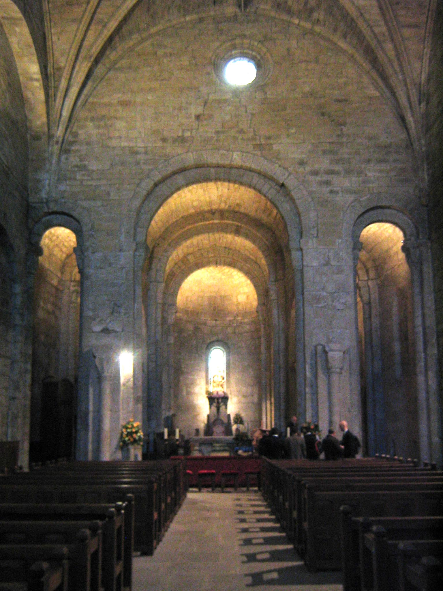 Monasterio de Leyre, inetrior de la iglesia, Yesa, Navarra (España).